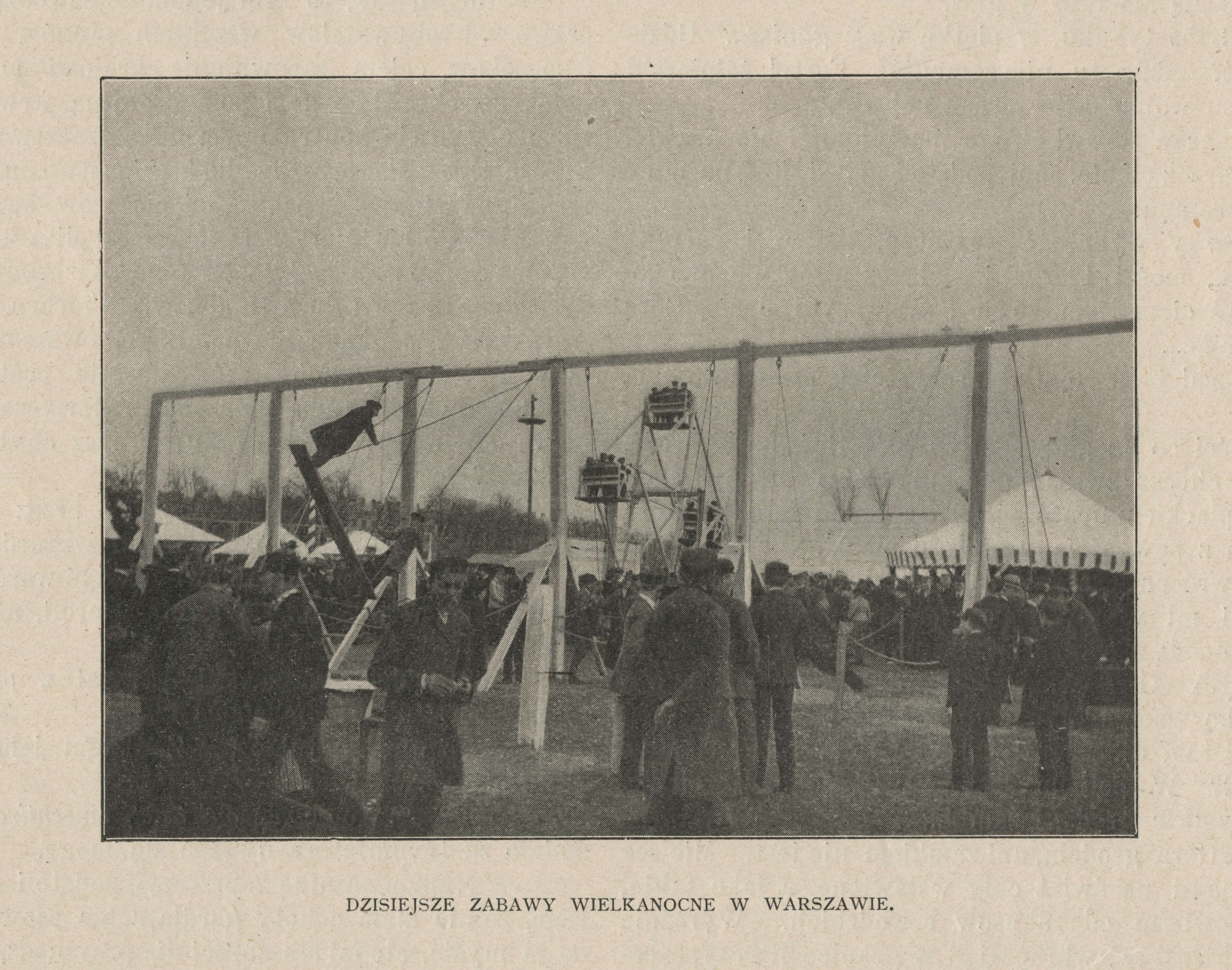 Dzisiejsze zabawy Wielkanocne w Warszawie